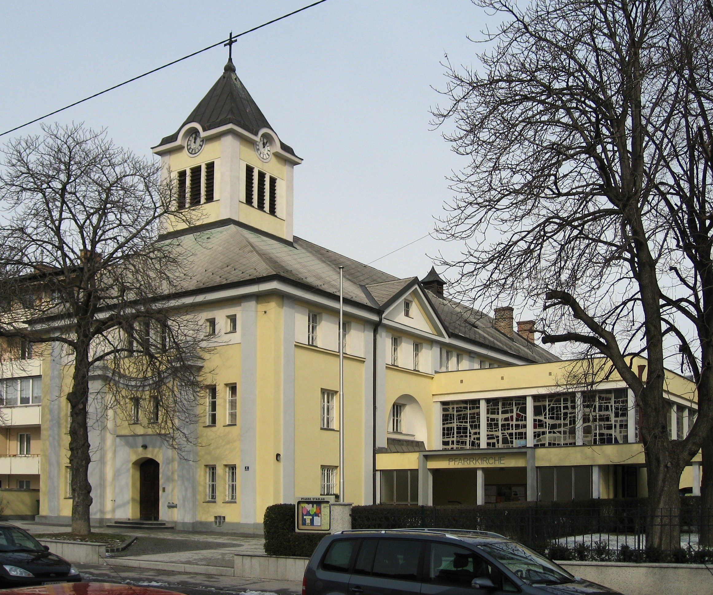 Wien, Stadlauer Pfarrkirche